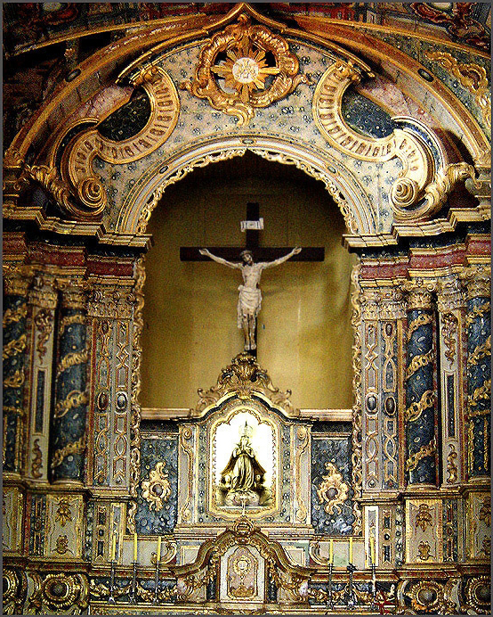 Detalhe do retábulo da capela-mor da Igreja de Nossa Senhora da Misericórdia, em Olinda, Brasil.